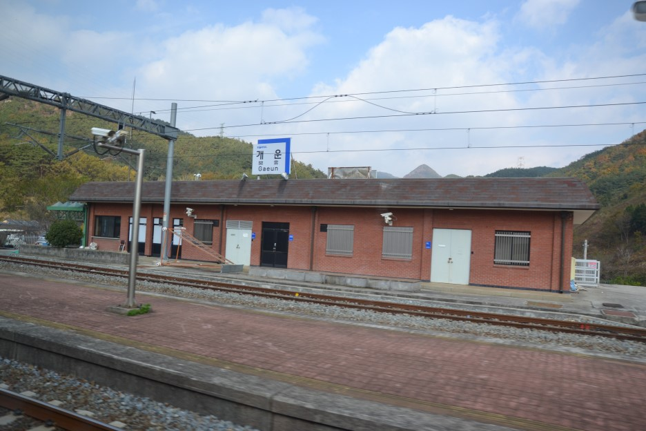 현재에도 속한 모습